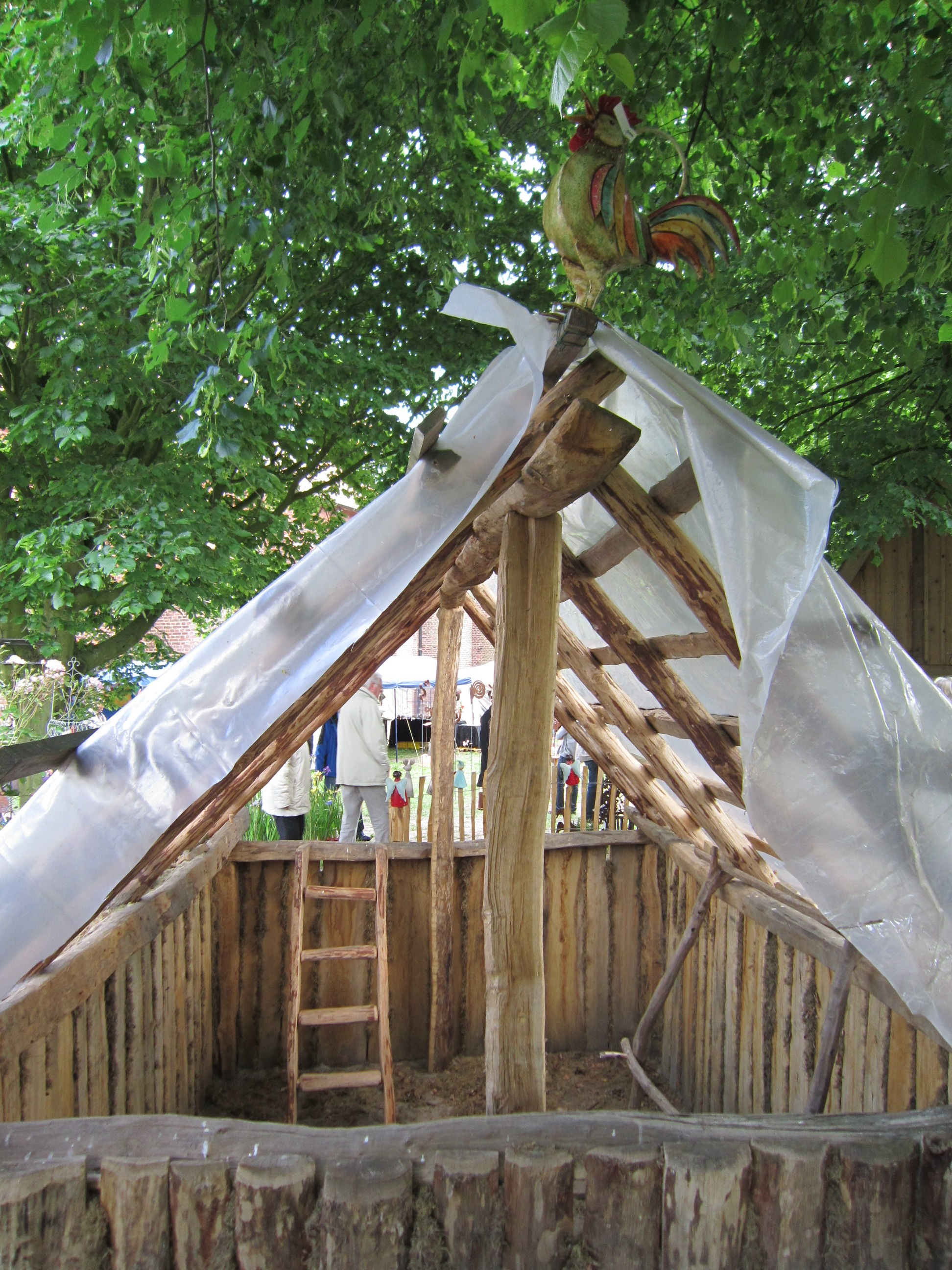 Grubenhaus hinter dem Zeughaus auf dem Gelände der Zitadelle Vechta